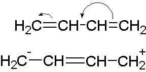 1,3-butadiene resonances